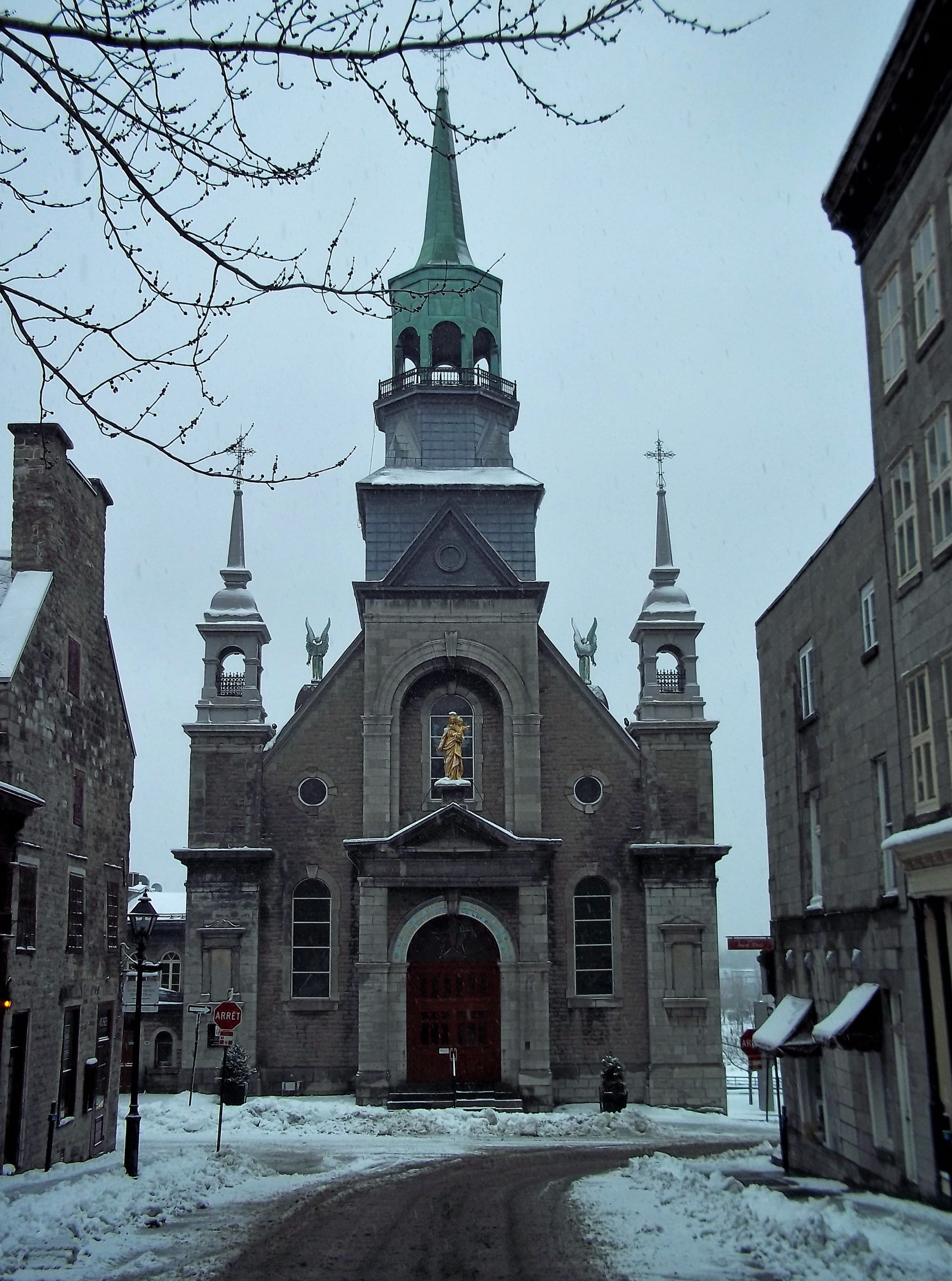 Chapelle Notre-Dame-de-Bon-Secours, vue de la rue Bonsecours, Montréal